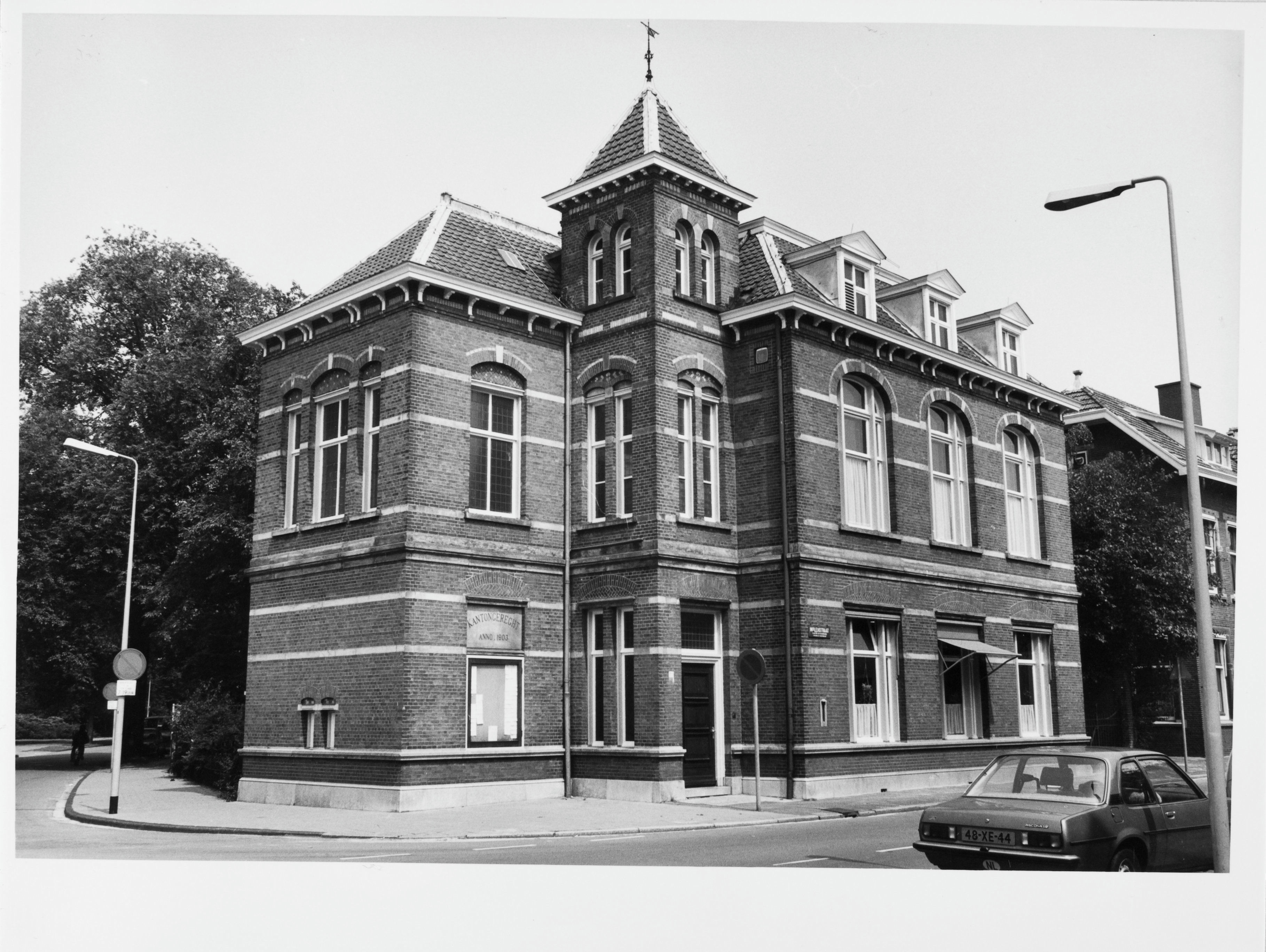 Kantongerecht: Overzicht kantongerecht (opmerking: Afdrukken verkregen via Ypie Attema, oud medewerkster van de Rijksdienst voor de Monumentenzorg.)